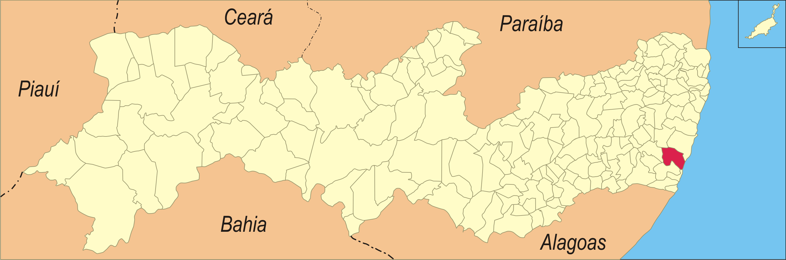 Localização da cidade em Pernambuco